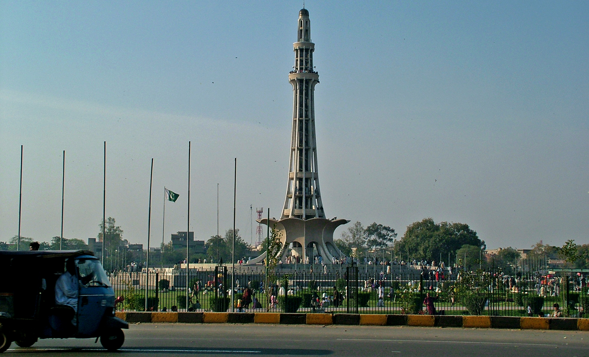 Minar-e-Pakistan